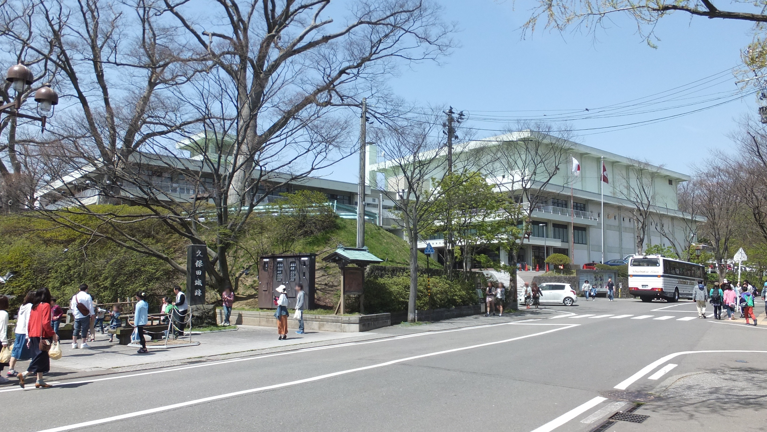 秋田県民会館全景、中土橋側より。秋田国体と同年の1961年、かつての秋田県記念館跡地に秋田県立図書館との複合施設として建設された。堀端に面した左側の分館ジョイナスはかつて秋田県立図書館として使用された建物である。